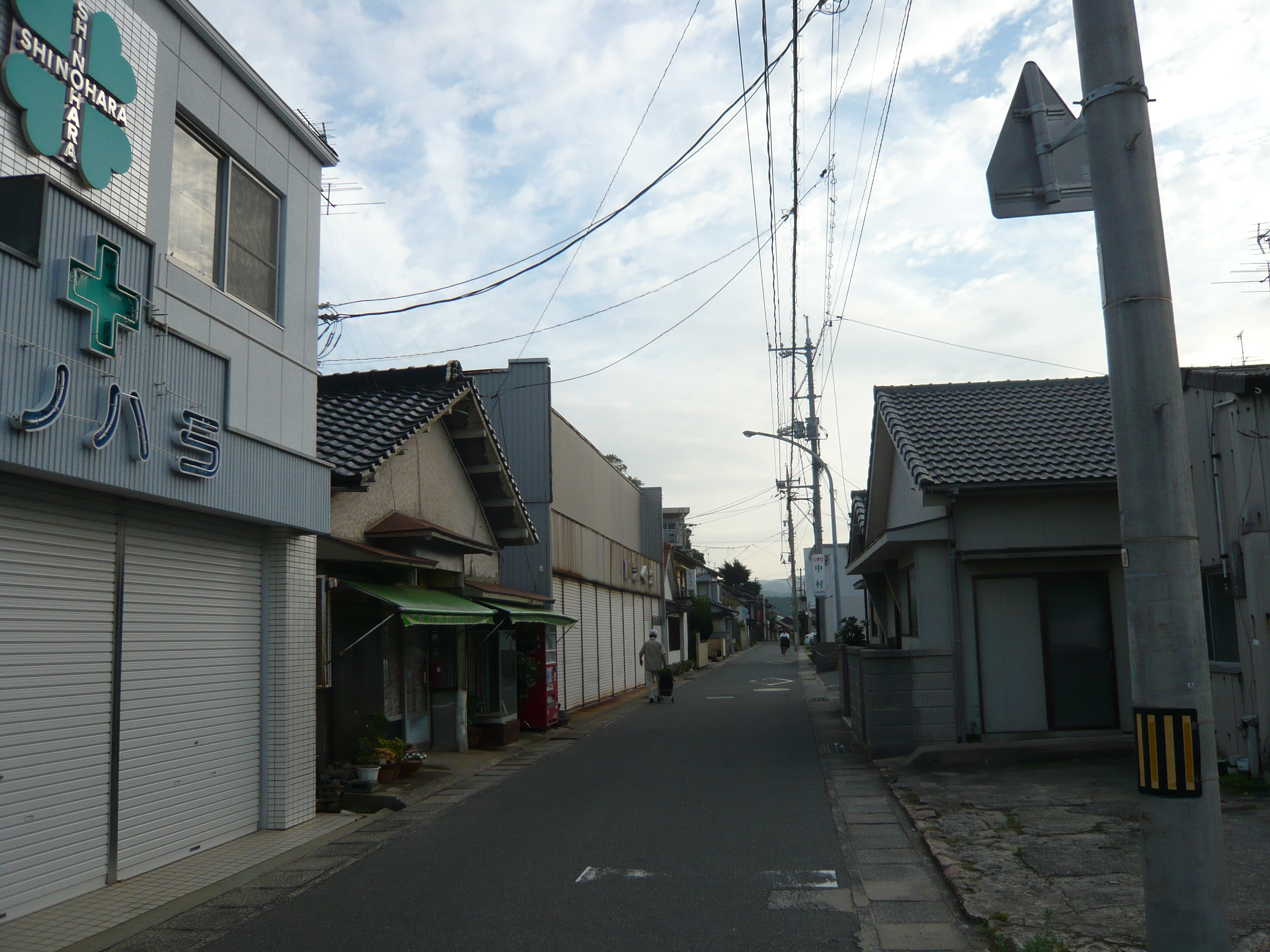 山陰線小串駅前